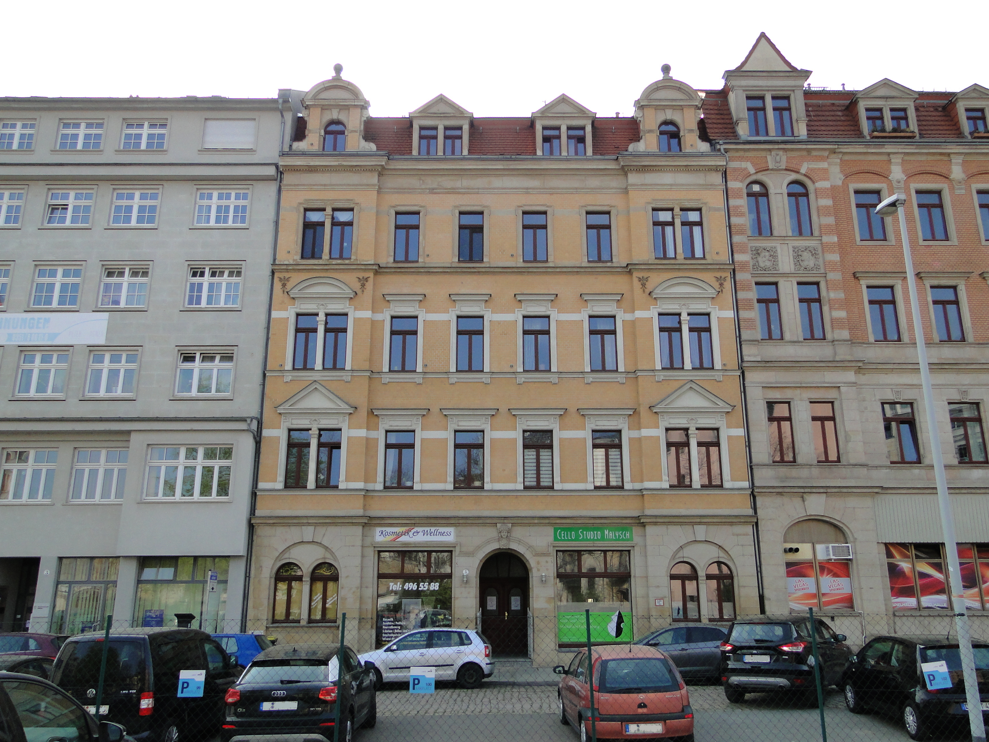 Haus Ritzenbergstraße 5 in Dresden, früherer Sitz der Obergrabenpresse